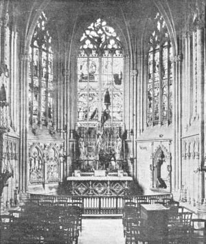 Часовня Святой Девы в Лизьё